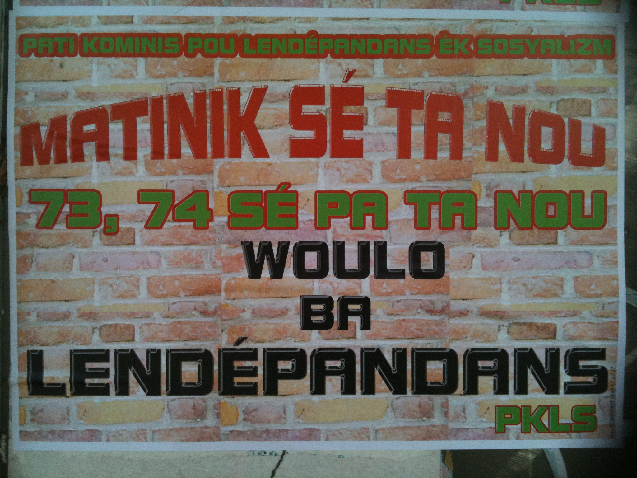 Affiche favorable à l'indépendance de la Martinique, décembre 2009, dans les rues de Fort-de-France